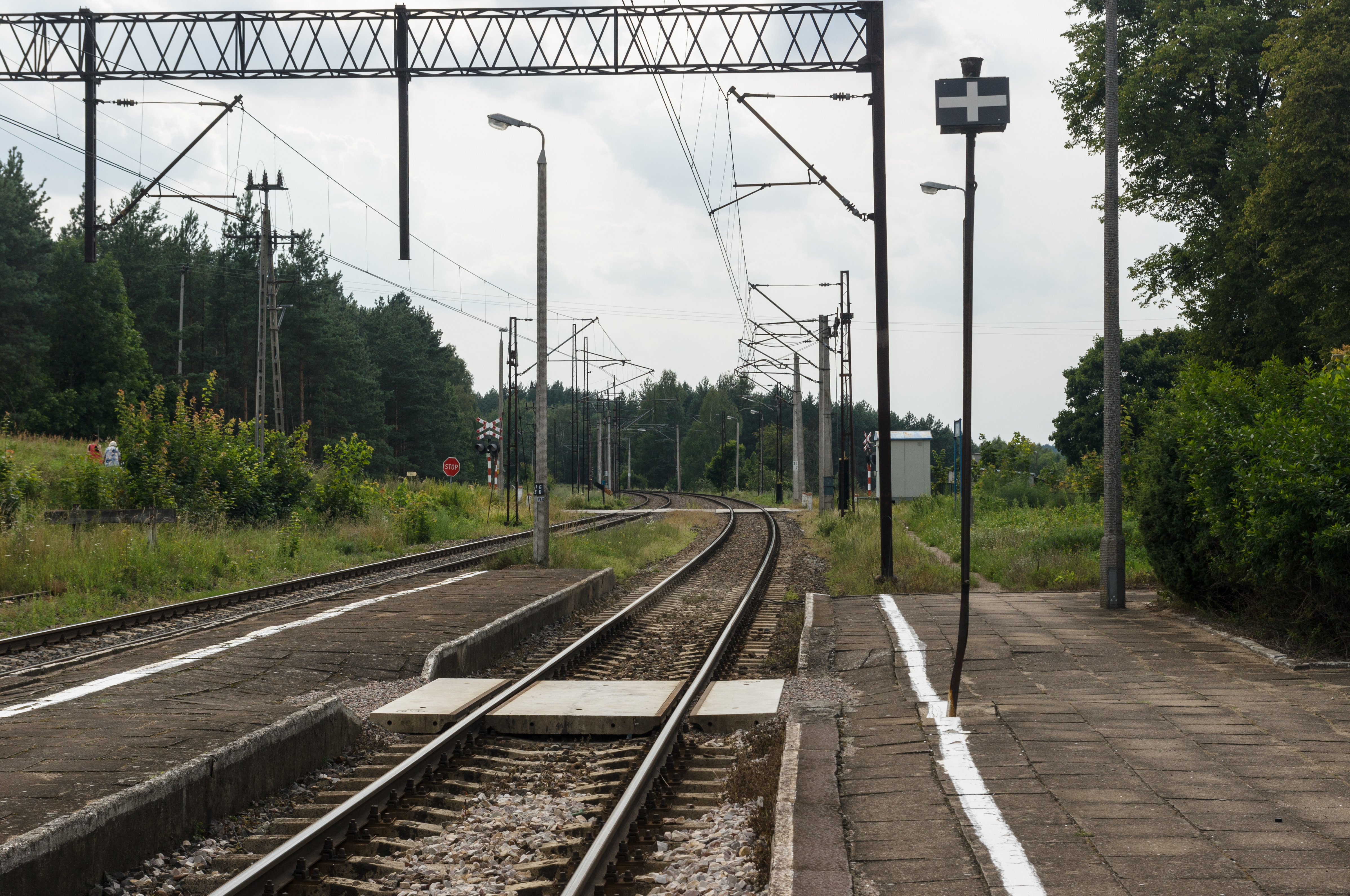 Przystanek kolejowy w Wipsowie na linii kolejowej nr 353, w województwie warmińsko-mazurskim, w powiecie olsztyńskim, w Polsce.